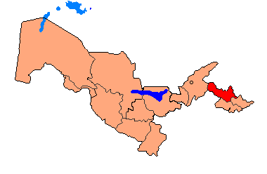 Uzbekistan - Namangan Province